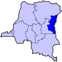 Kivu Region.